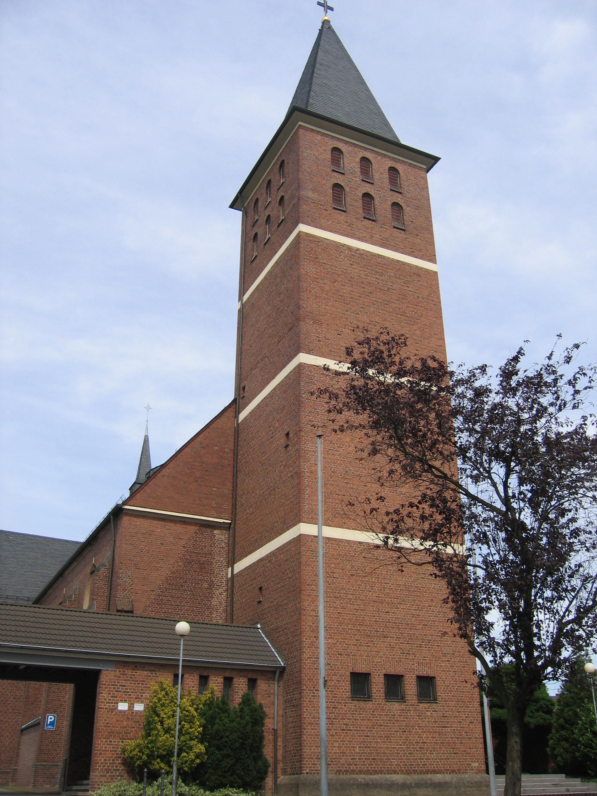 Kirche St. Josef in Kerpen-Brüggen